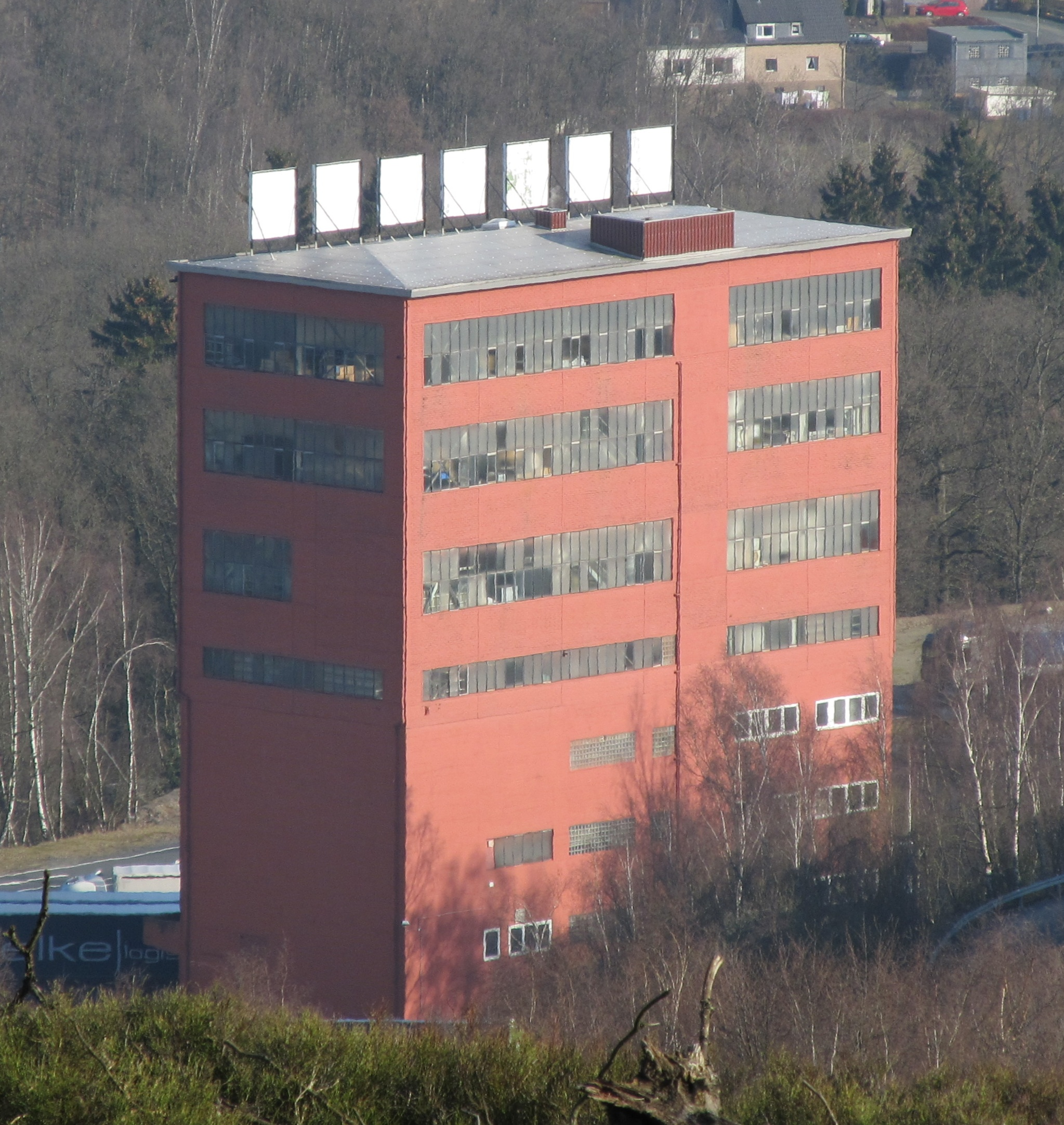 Ehemalige Aufbereitungsanlage der Grube Pfannenberger Einigkeit, Salchendorf (Neunkirchen).